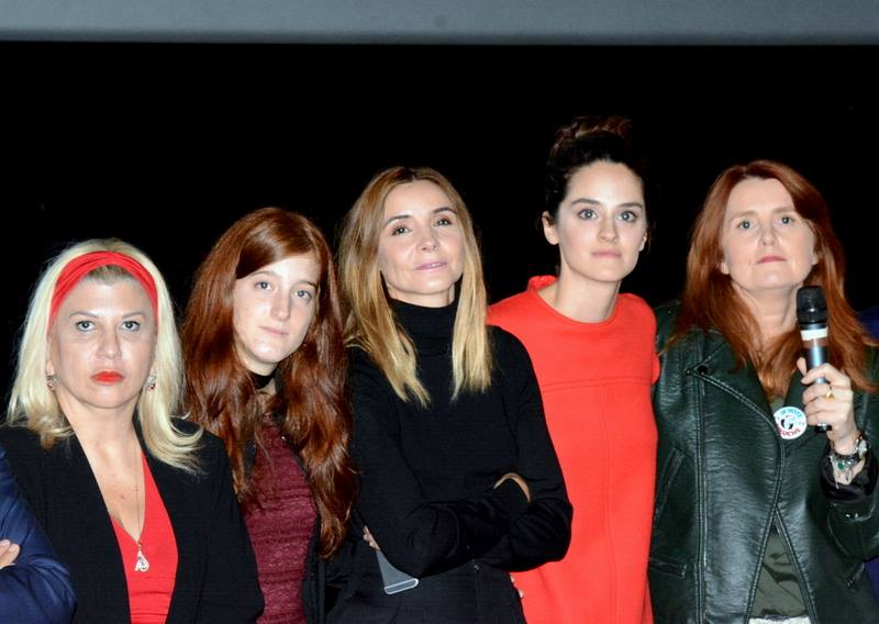 Dounia Bouzar, Naomi Amarger, Clotilde Courau, Noémie Merlant et Marie-Castille Mention-Schaar à une avant-première du film "Le Ciel attendra".